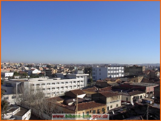 vue latérale